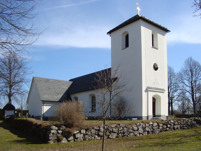 Täby kyrka, Närke